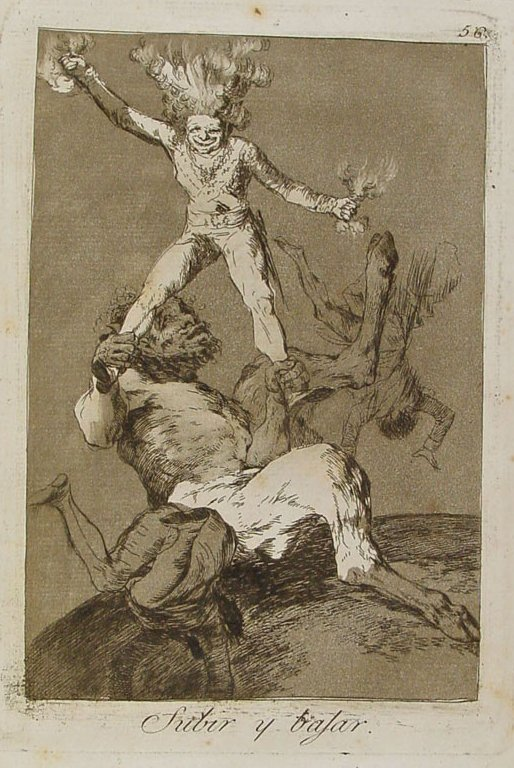 Capricho nº 56: Subir y bajar de Goya, serie Los Caprichos